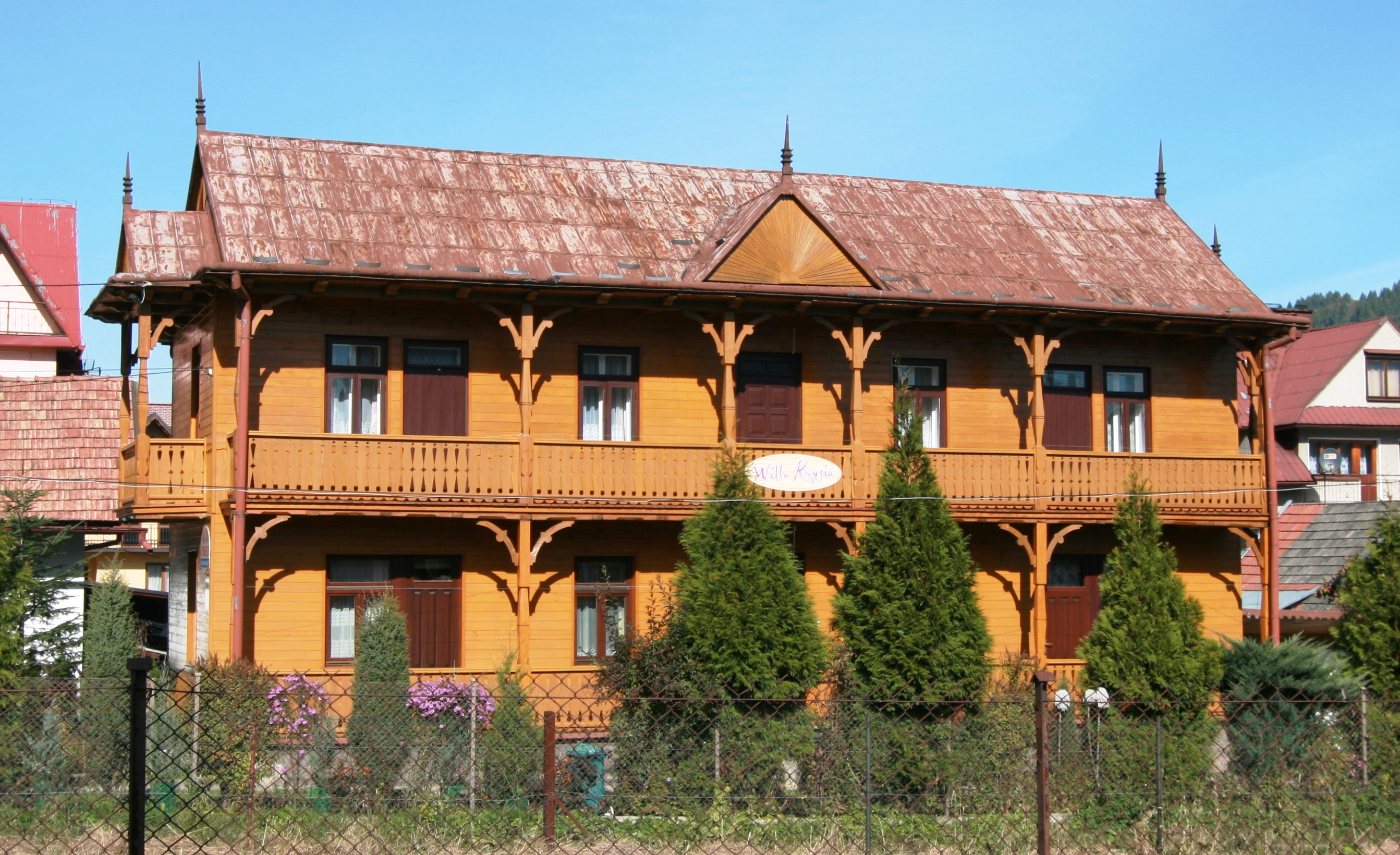 Willa Krysia – pensjonat prowadzony przez p. Krystynę Aleksander, przy ul. św. Kingi 51 w krościenku nad Dunajcem